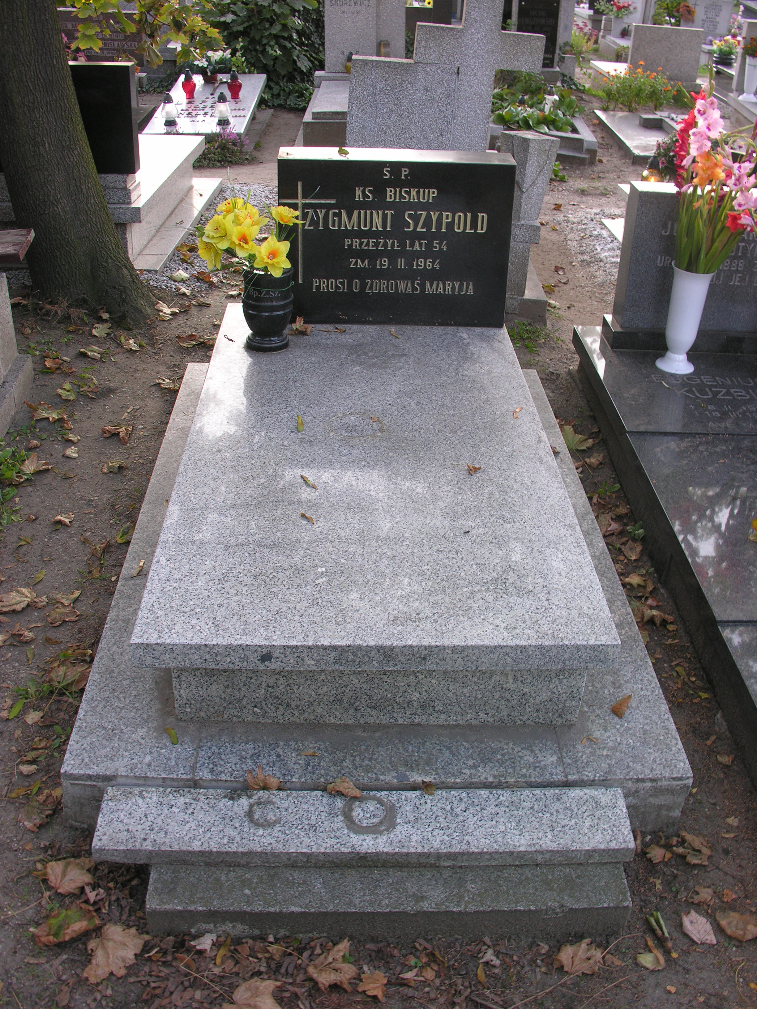 Grób biskupa Zygmunta Szypolda na cmentarzu przy ul. Bujwida we Wrocławiu